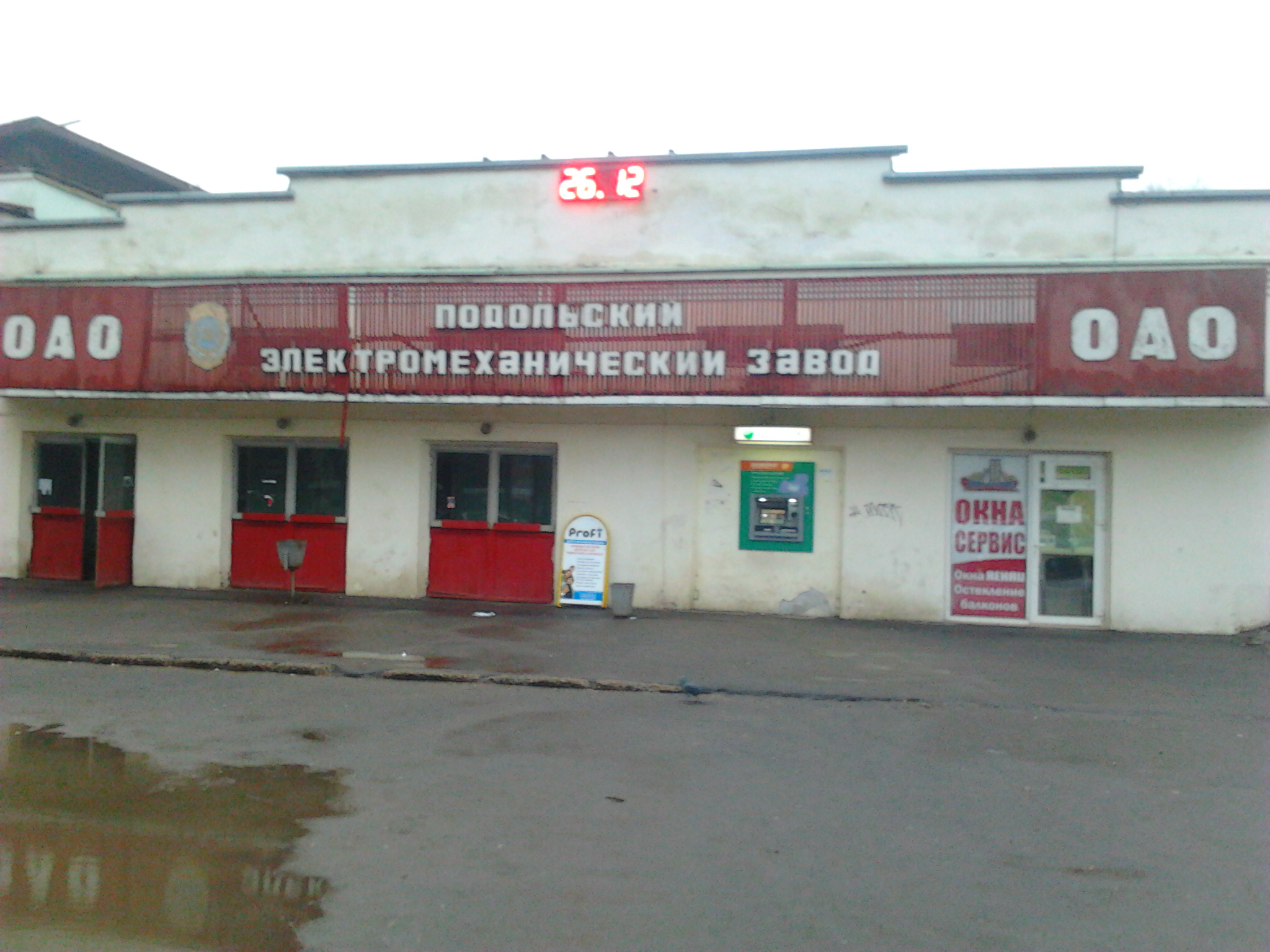 Проходные